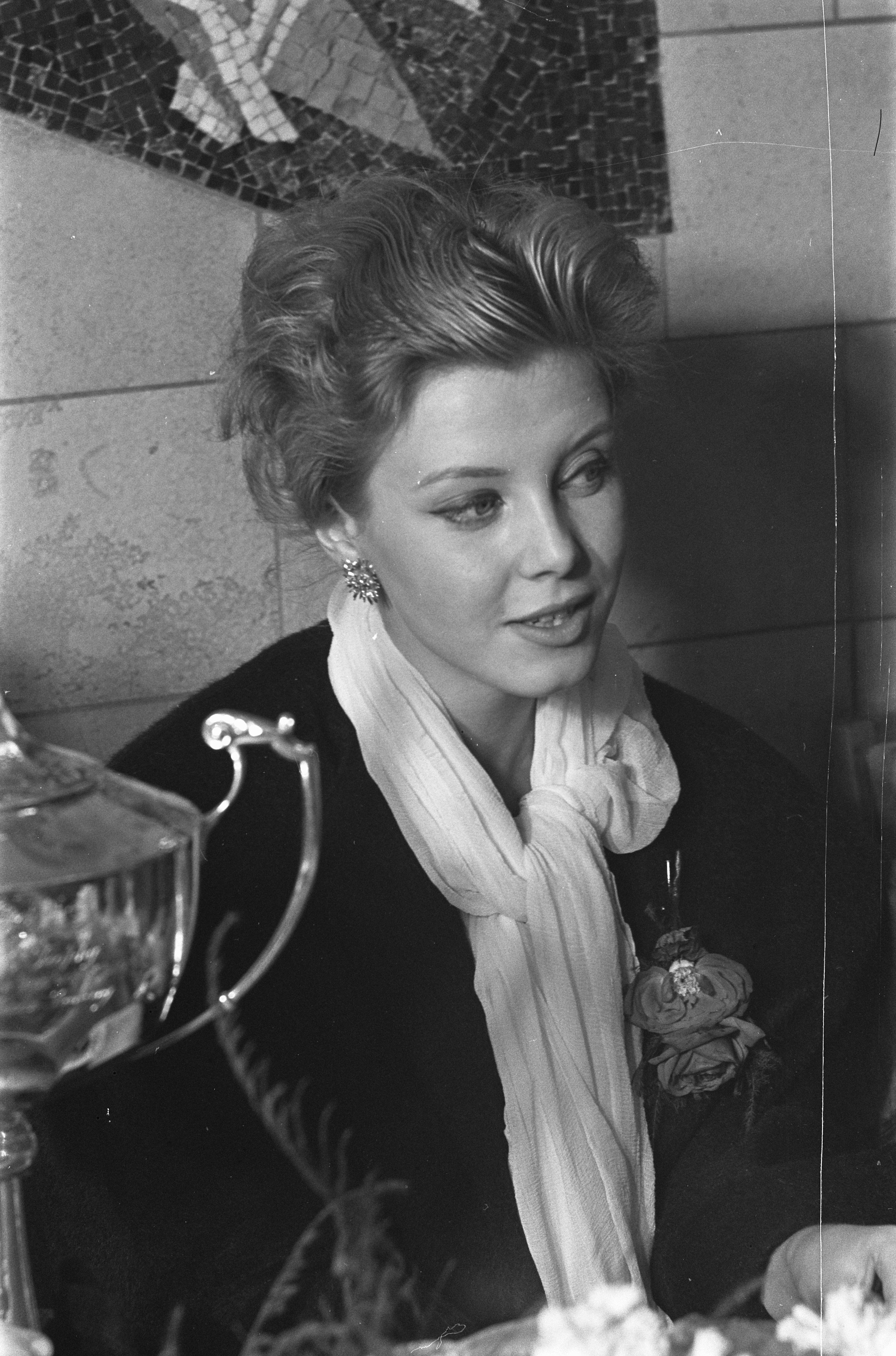 Collectie / Archief : Fotocollectie Anefo Reportage / Serie : Miss World 1959 Beschrijving : Aankomst van Corine Rottschäfer (miss World 1959) op Schiphol Datum : 13 november 1959 Locatie : Noord-Holland, Schiphol Trefwoorden : aankomsten, missen, missverkiezingen, portretten, vliegvelden Persoonsnaam : Rottschäfer, Corine Instellingsnaam : Miss World Fotograaf : Fotograaf Onbekend / Anefo Auteursrechthebbende : Nationaal Archief Materiaalsoort : Negatief (zwart/wit) Nummer archiefinventaris : bekijk toegang 2.24.01.05 Bestanddeelnummer : 910-8188